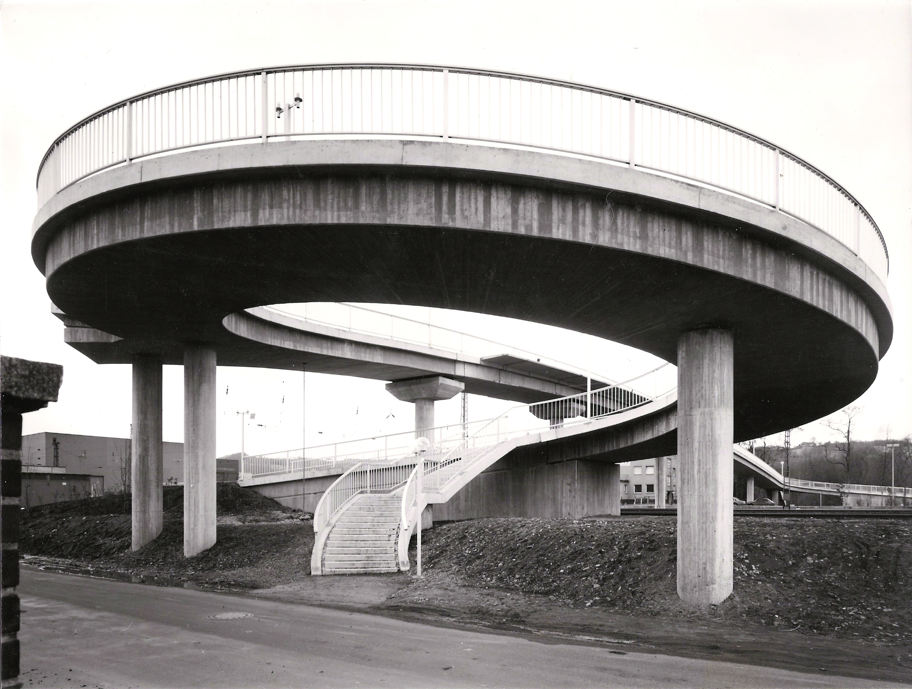 Fußgängerbrücke August-Lepper-Straße/Lohfelder Straße in Bad Honnef: Ansicht von der August-Lepper-Straße